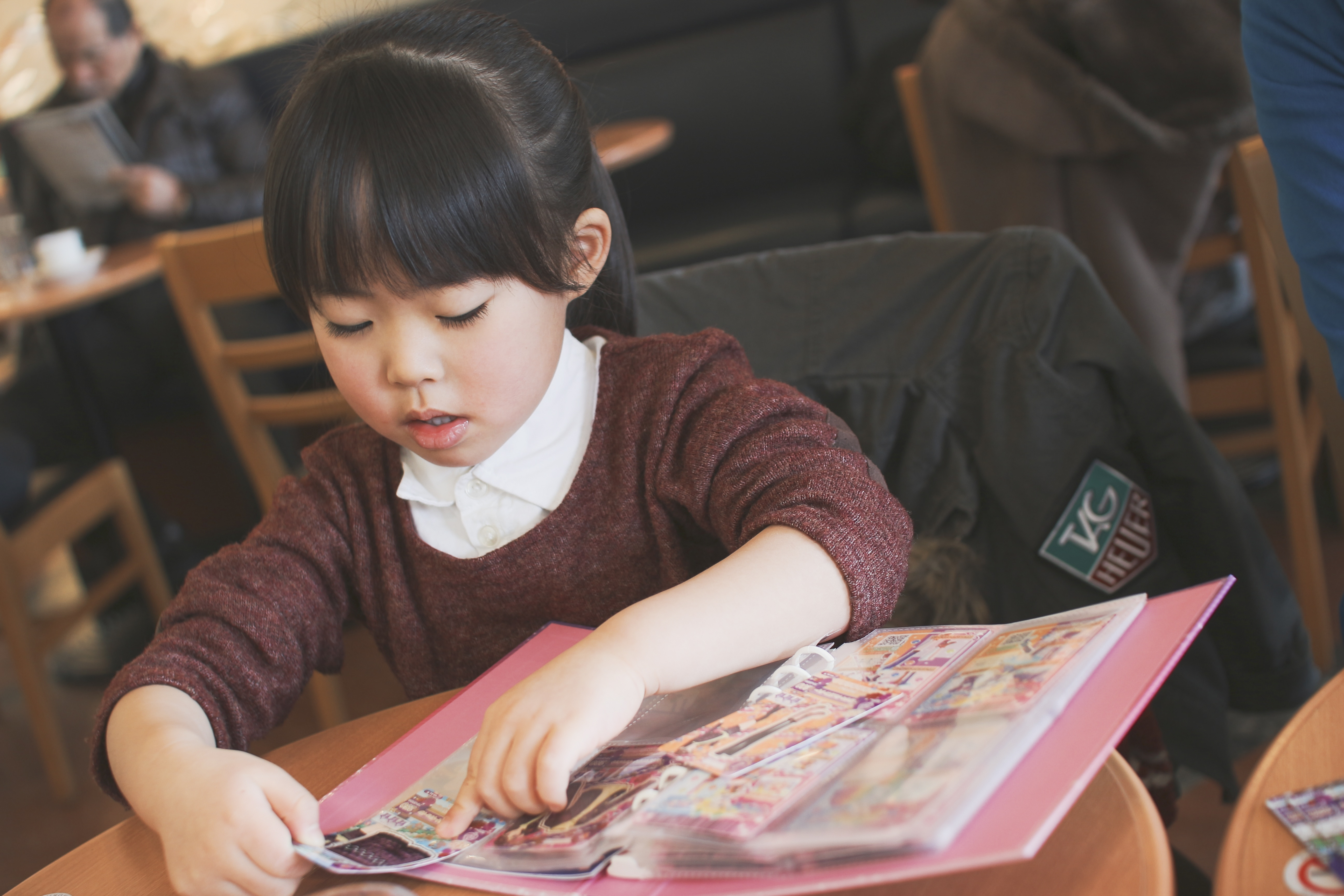 My daughter. 辛いインフルエンザに耐えたご褒美として櫻子さんに与えられたのは、 本日発売の「 アイカツ！公式カードバインダー 」。 これ、凄い人気な品薄商品のようで、早速ネットでも高値取引させているようですが、 我々はフツーに店頭で購入できました。 店頭で見ていて驚くのは、ただキャラクターの絵が描いているだけのバインダーが 次から次へと飛ぶように売れていること。幼稚園児〜小学校低学年の女児たちが 群がっておりました。彼女らにとっては、公式バインダーを持って カードダス機の前に並ぶのがステータスなようです。 それにしてもすげーな、「アイカツ！」人気は。さすが電通。 （櫻子さん、5歳3ヶ月）